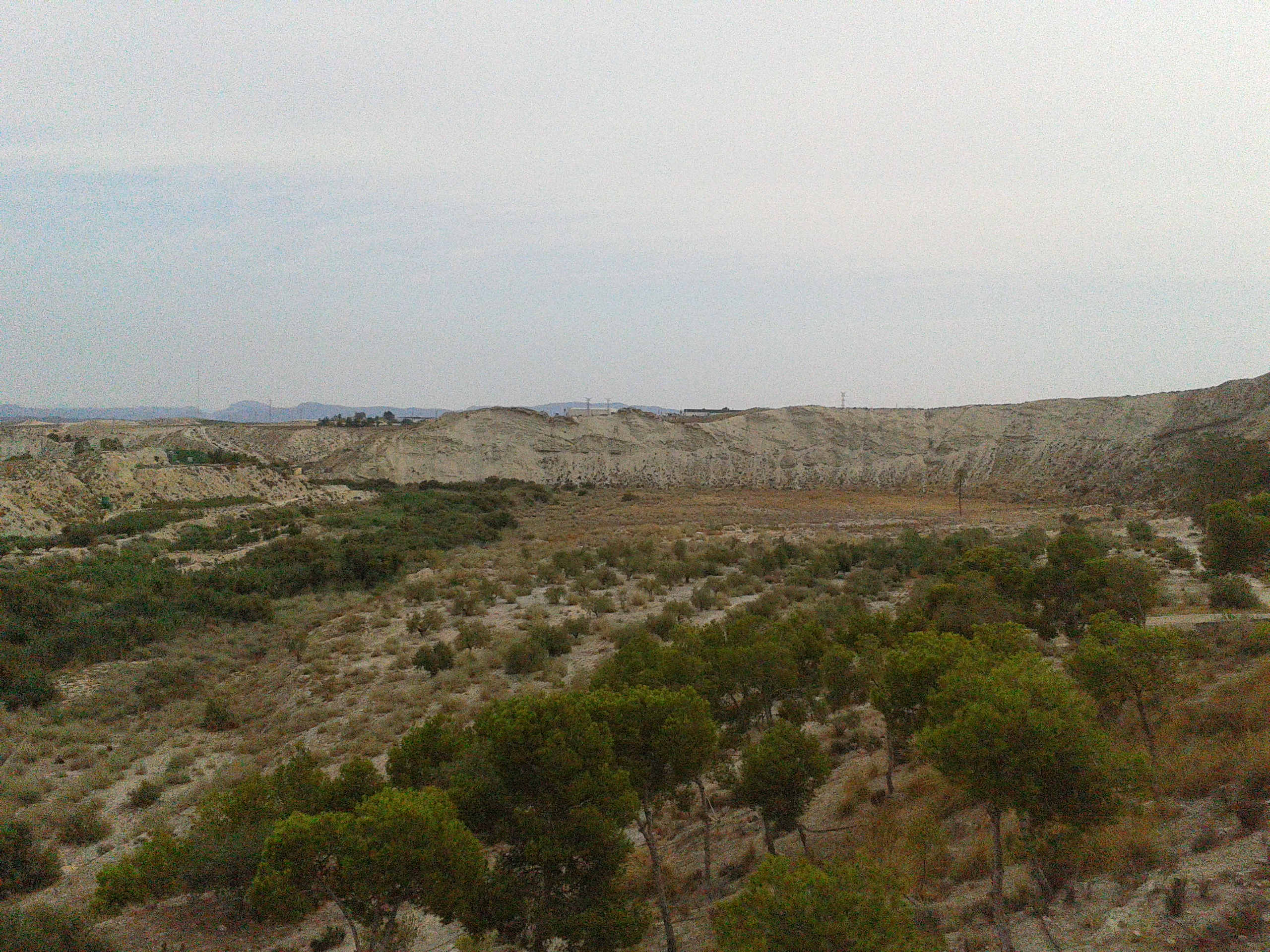 Paisaje de badlands en el paraje del Rodeo de la Ermita y la Pilica.